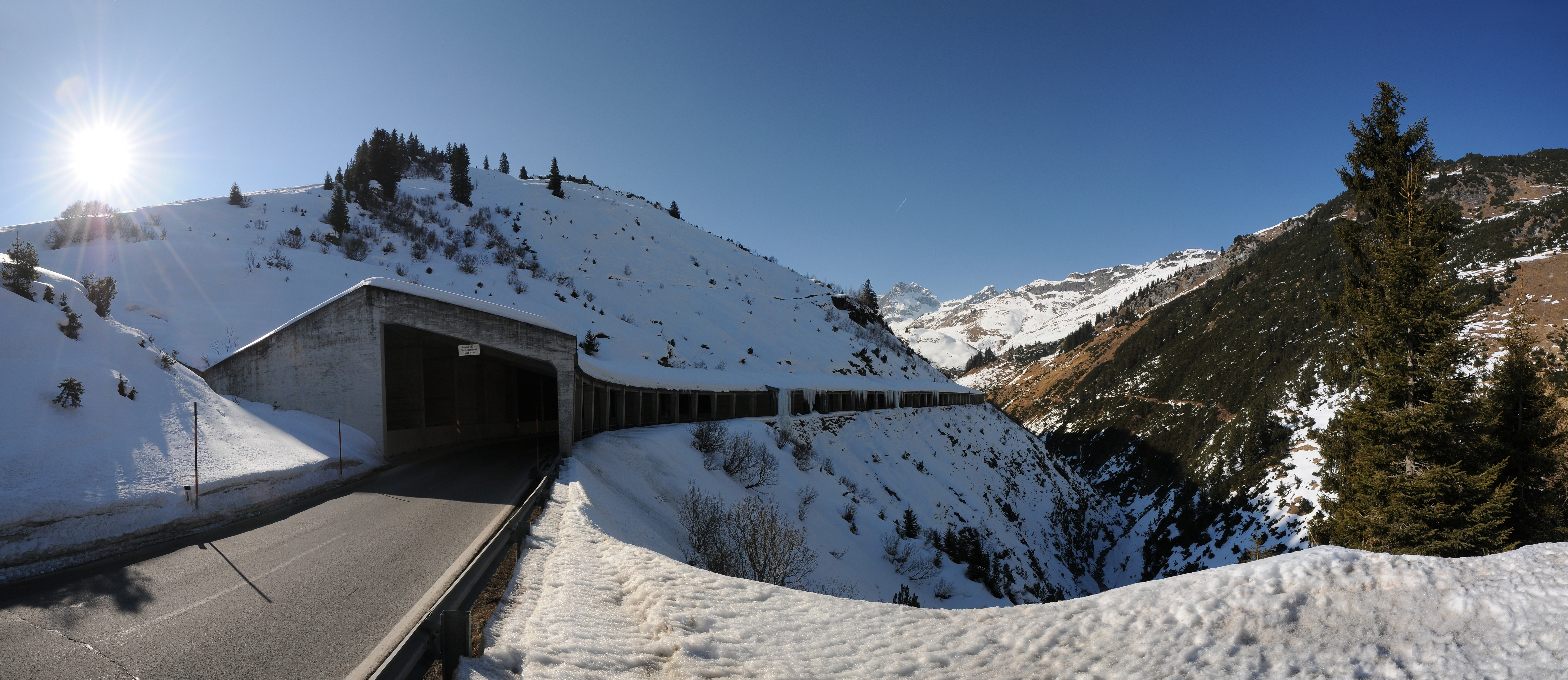 Panoramaaufnahme vom Holzbodentunnel in Warth.